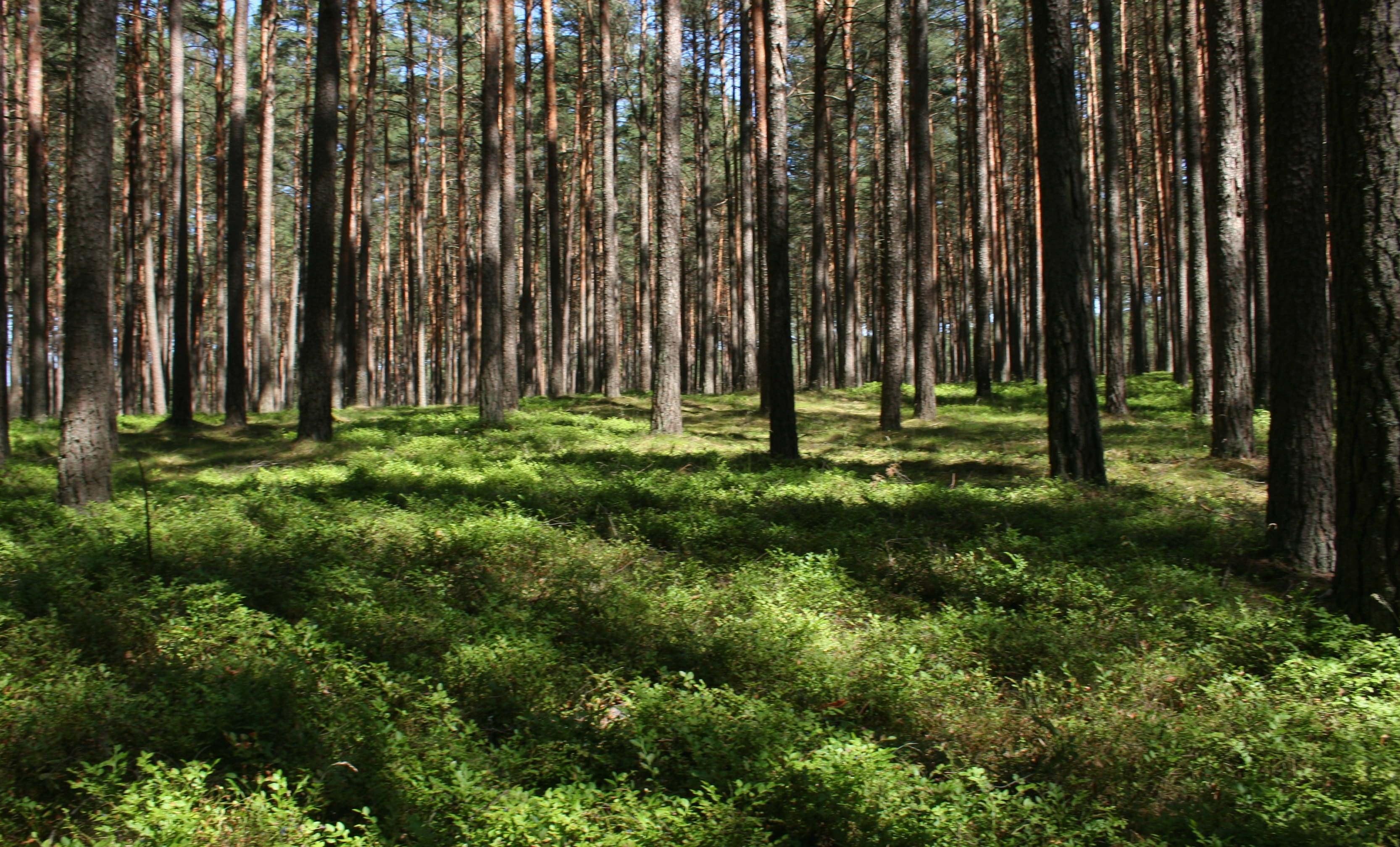 Bór sosnowy (świeży) w rezerwacie przyrody Kręgi Kamienne w Odrach, gmina Czersk